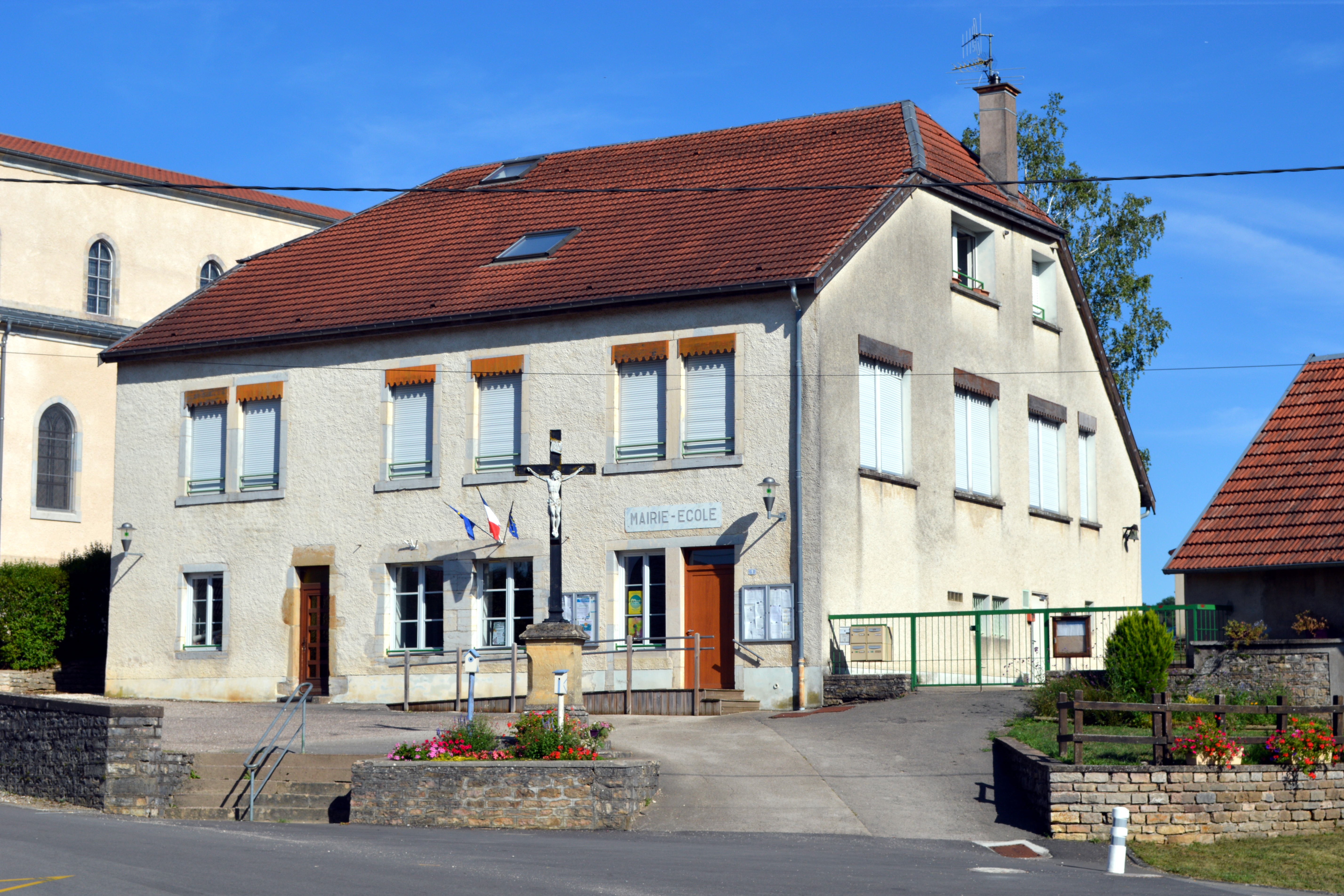 Bâtiment abritant la mairie et l'école de la commune de Noironte, dans le département du Doubs, à l'été 2019.